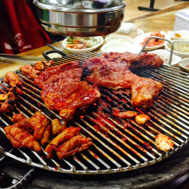 춘천 닭갈비